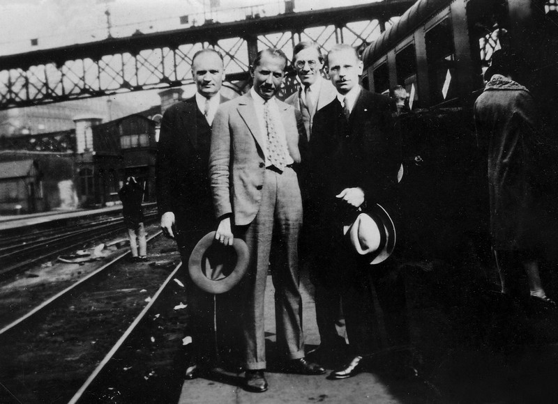 Зліва направо: Григорій Каленик Лисюк, Євген Коновалець, Іван Рудаків, Микола Сціборський.